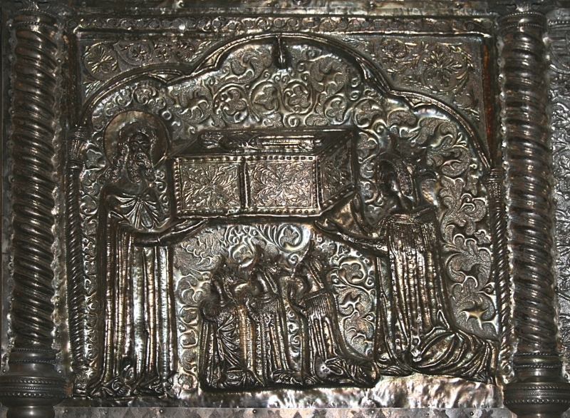 Svečano proglašenje i predstavljanje novih članova Hrvatske akademije znanosti i umjetnosti u Zagrebu